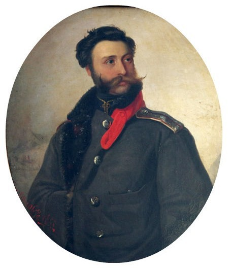 Александр Александрович Татищев (1822/3—1895)